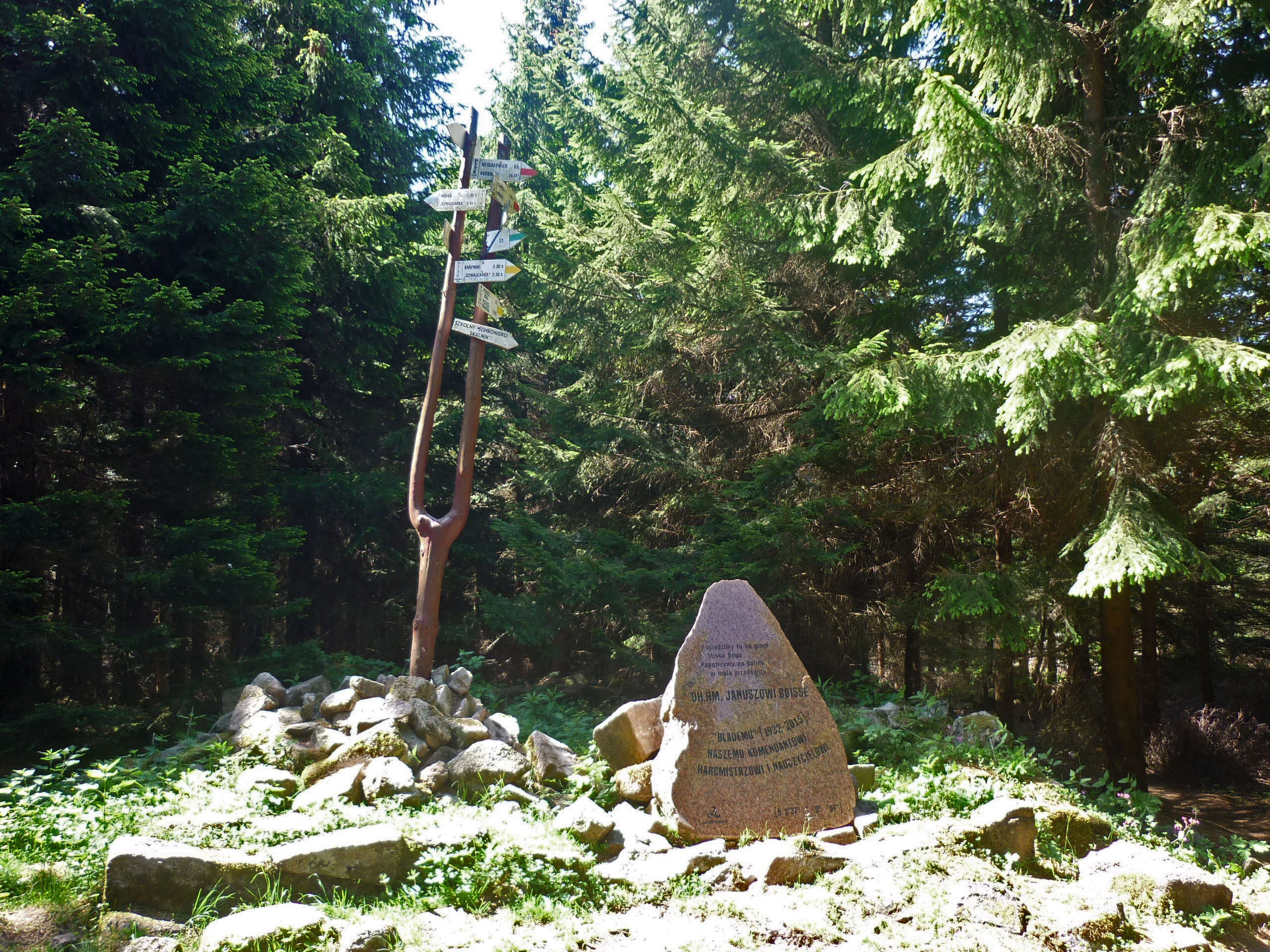 Landeshuter Kamm (Rudawy Janowickie): Wanderweg an der Freien Koppe (935 m) (Ostra Mała) mit Gedenkstein für Janusz Boisse (1932–2015)